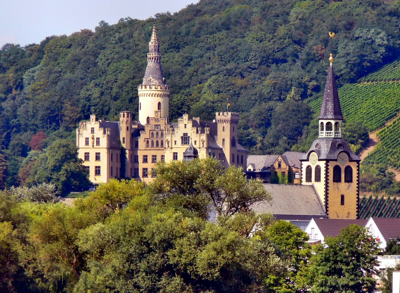 Ansicht des Schlosses Arenfels in Bad Hönningen